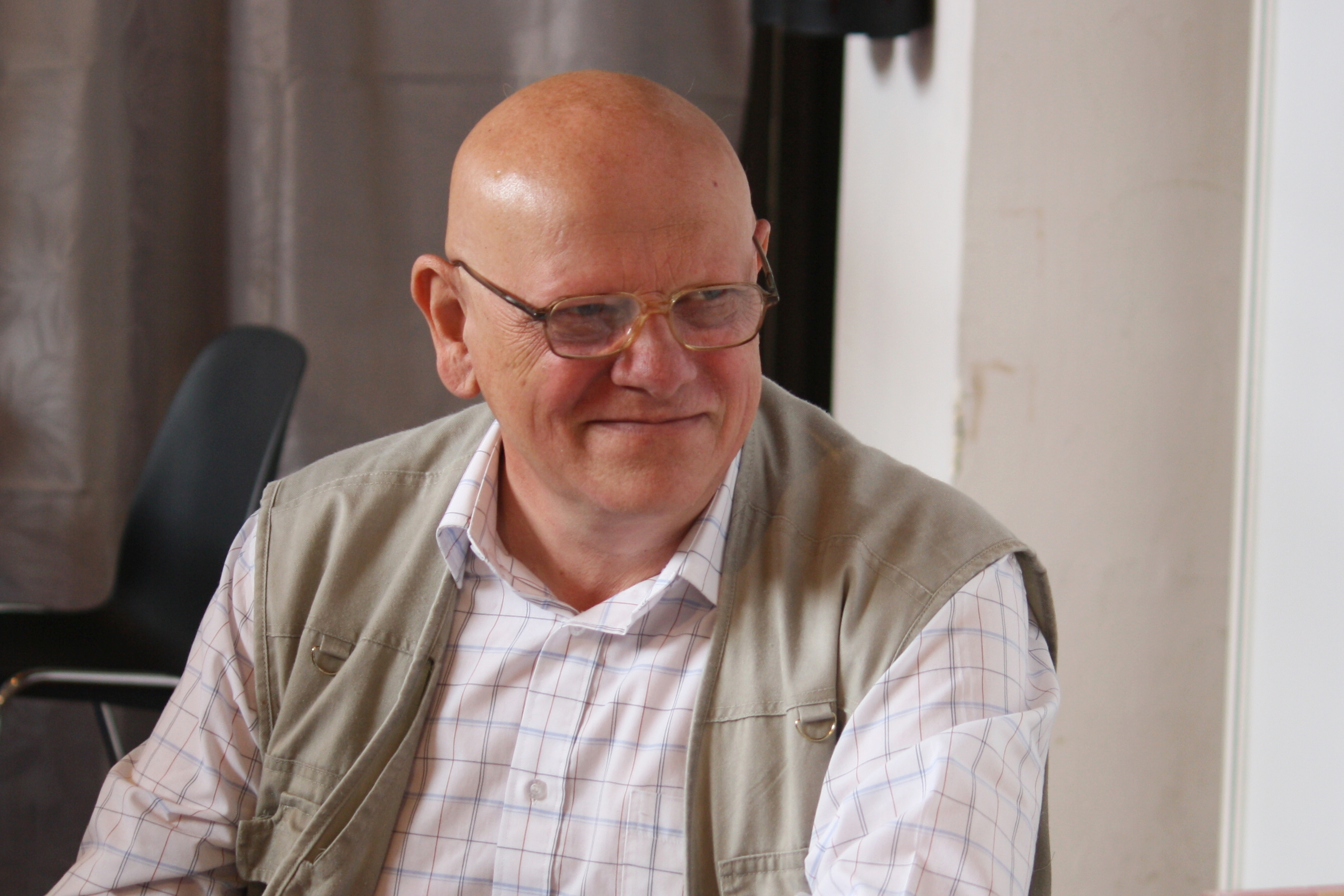 Otomar Dvořák na 17. mezinárodním knižním veletrhu Svět knihy v Praze Personality rights warning Although this work is freely licensed or in the public domain, the person(s) shown may have rights that legally restrict certain re-uses unless those depicted consent to such uses. In these cases, a model release or other evidence of consent could protect you from infringement claims.